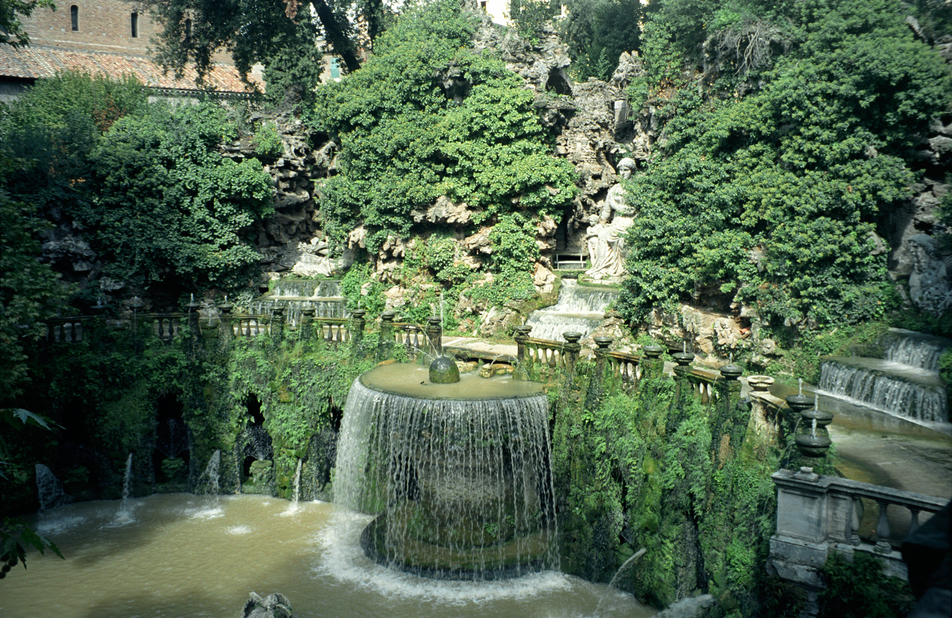 Villa d'Este, Tivoli